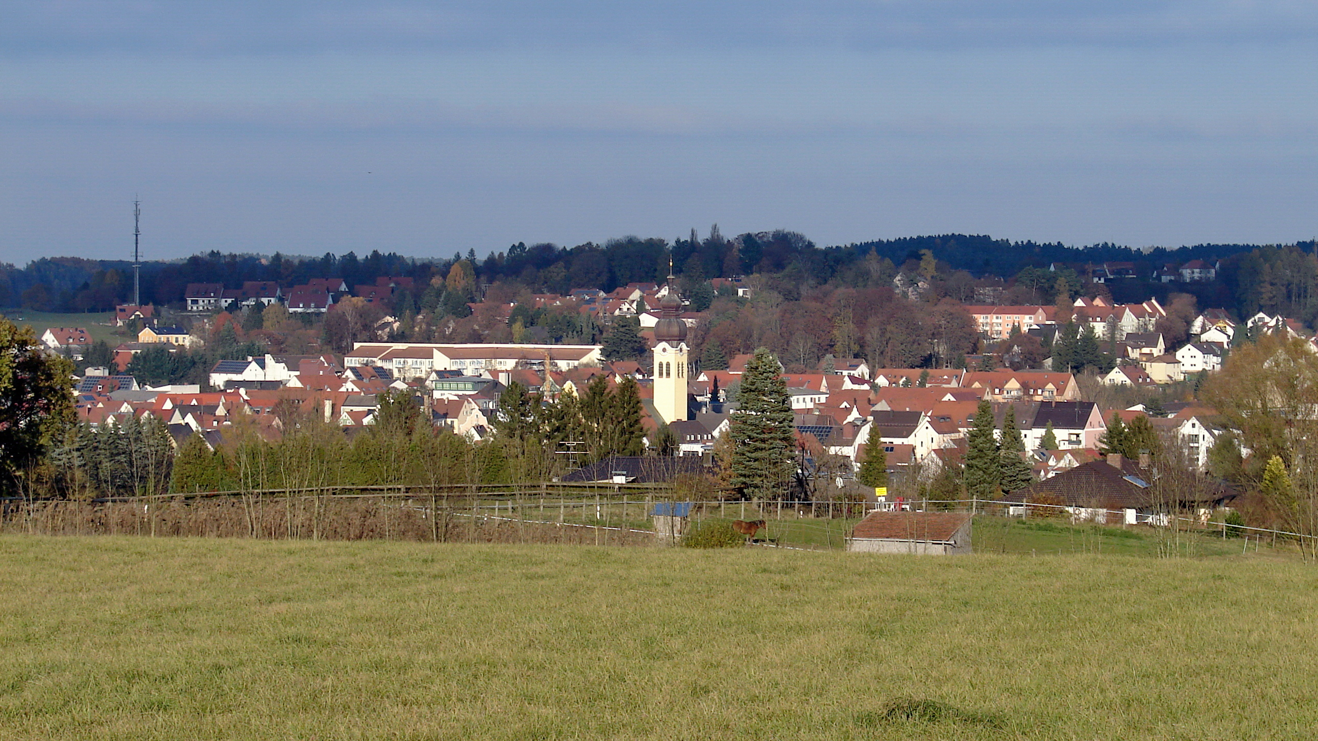 Blick auf Wolnzach von Westen